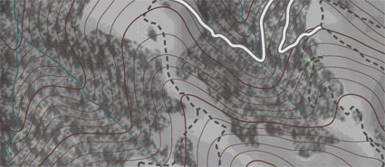 Zu sehen ist eine 3-D-Darstellung von Vegetationmustern.